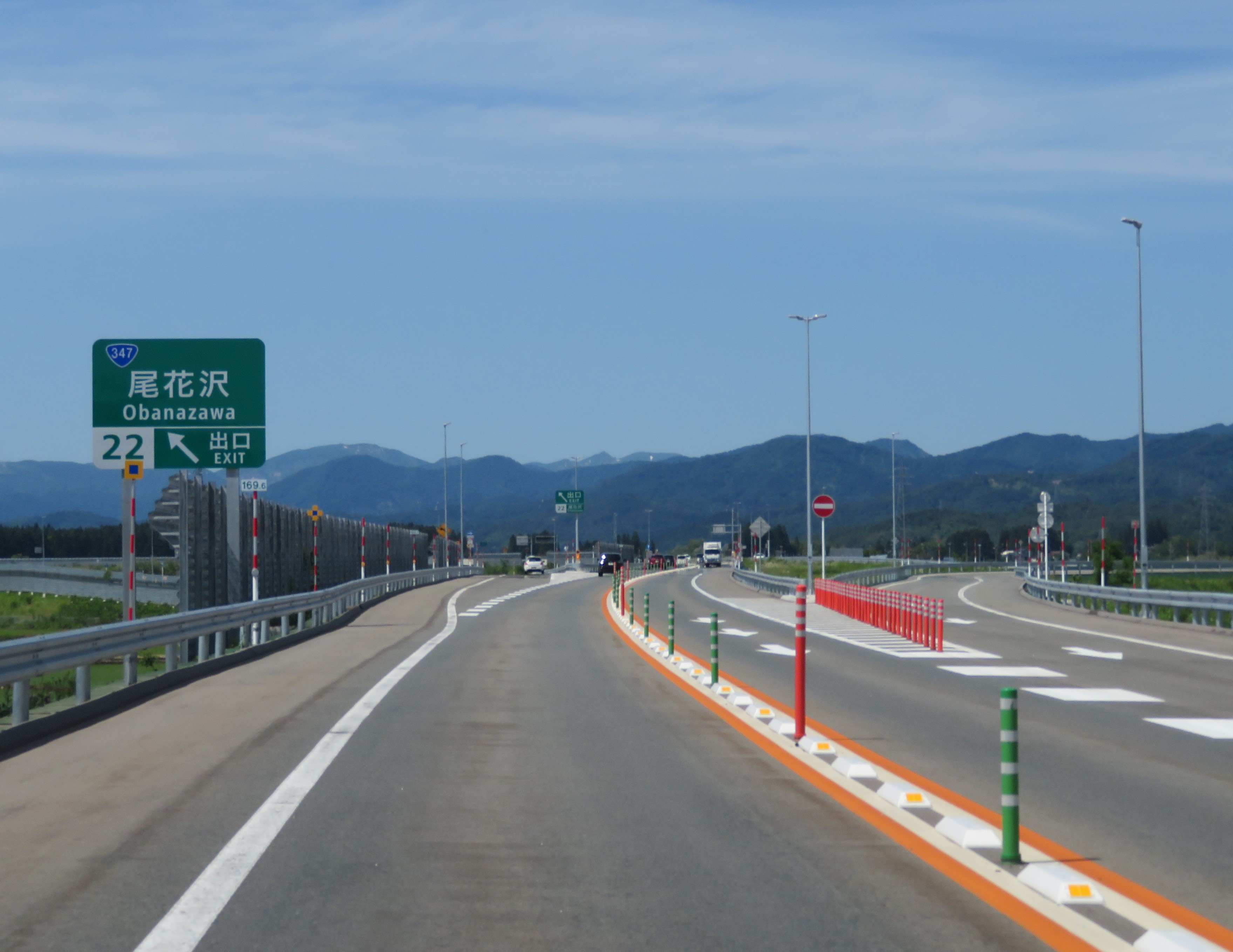 東北中央自動車道尾花沢IC出入口付近（新庄方面を撮影） Canon PowerShot SX720 HS